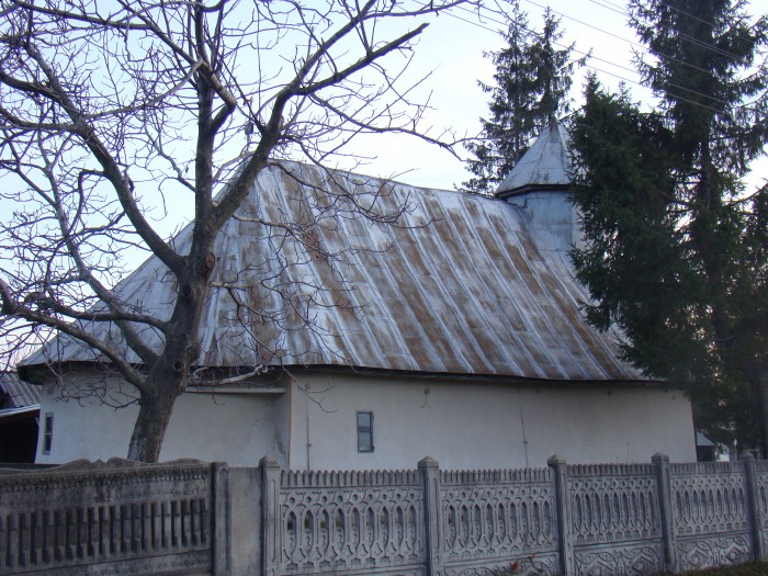 Vedere generală asupra bisericii de lemn Obogeni, Vâlcea